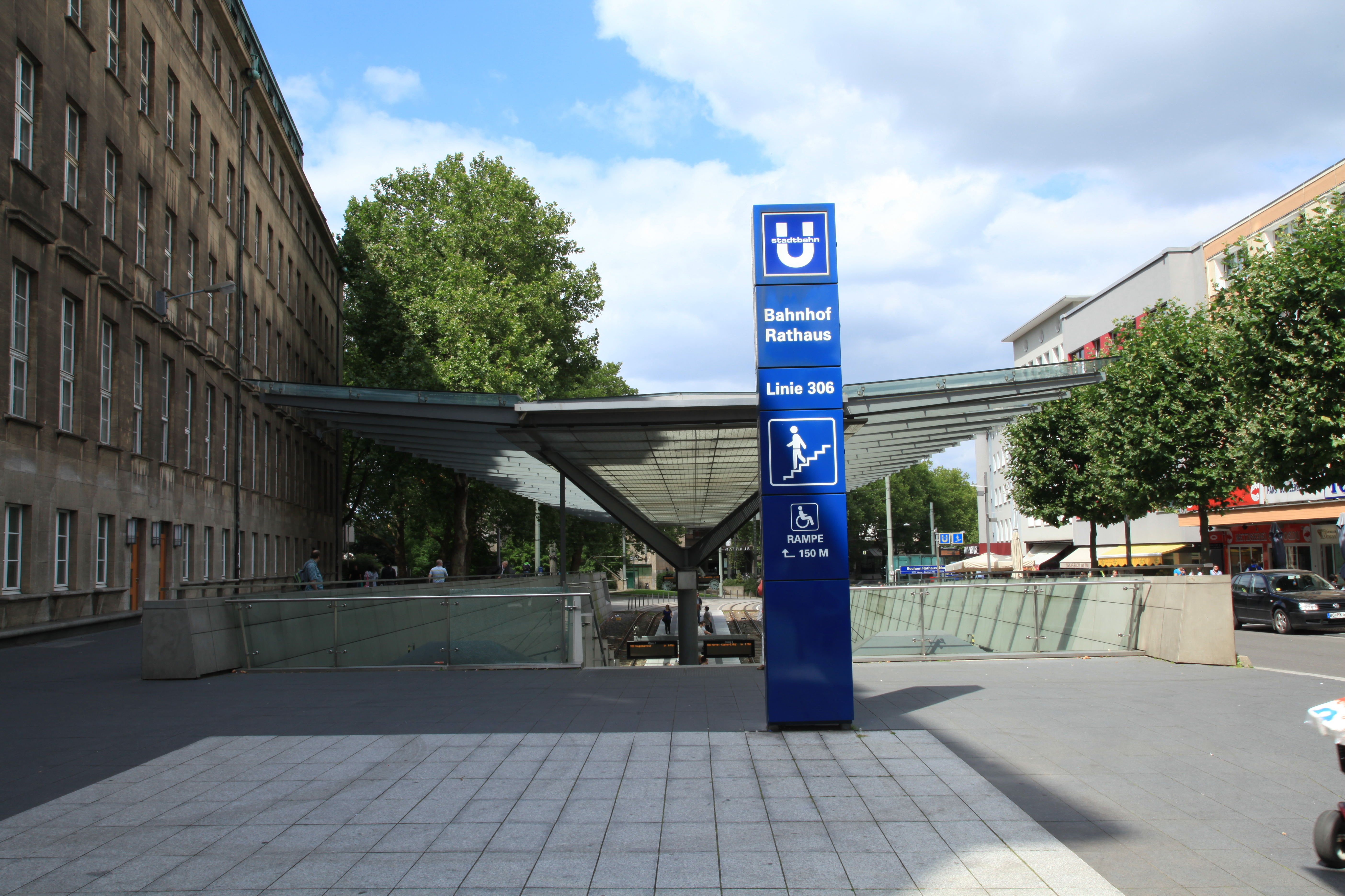 Bahnhof Rathaus, Hans-Böckler-Straße in Bochum